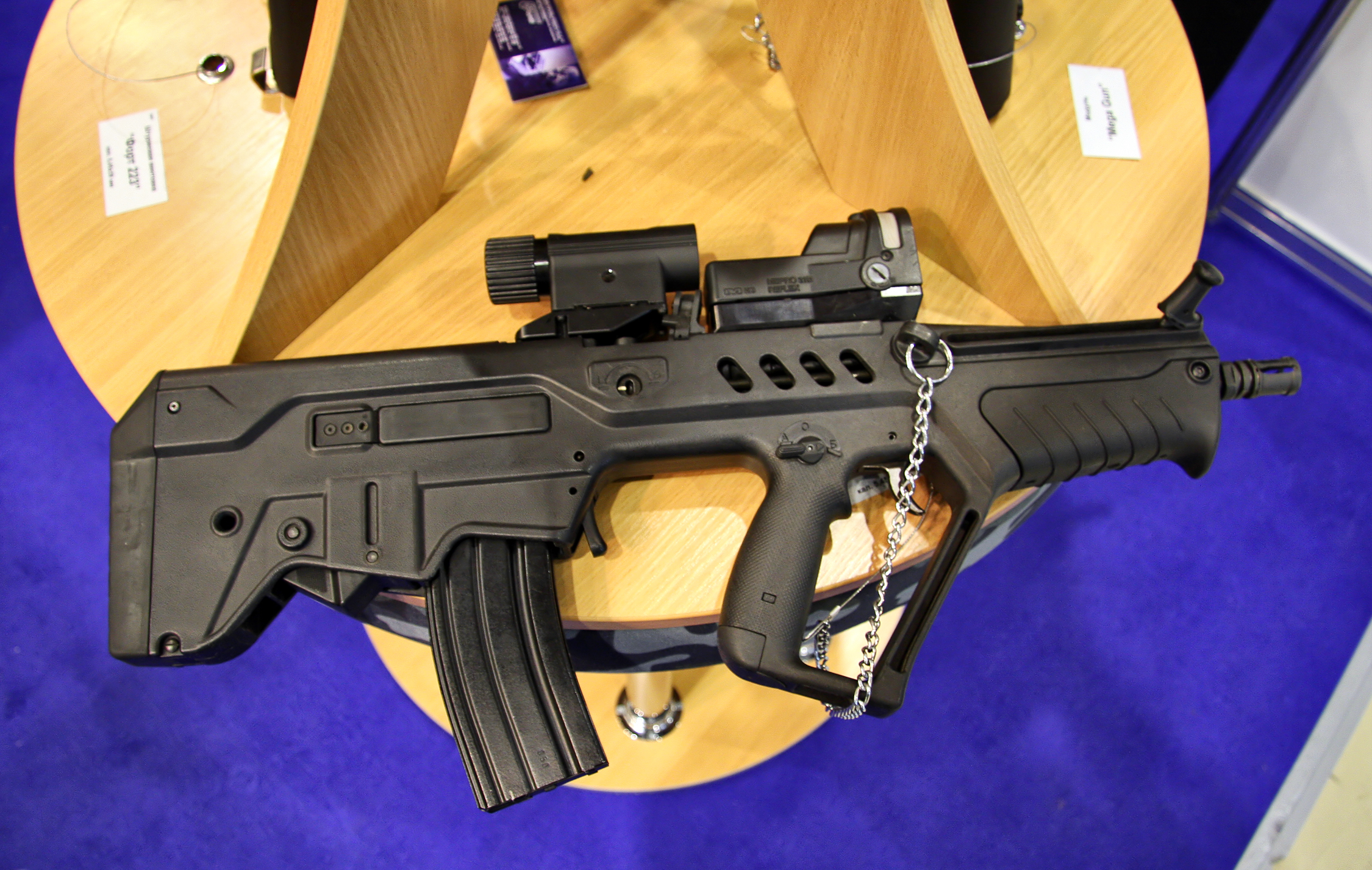 Форт 221 (Fort 221)